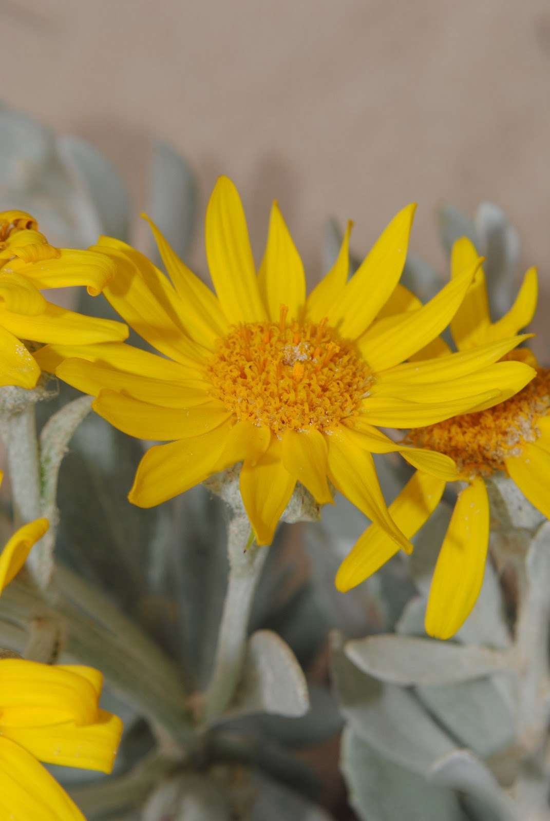 Senecio crassiflorus. Asteraceae. Fotos tomadas sobre dunas al margen del Río de la Plata en Carrasco, departamento de Canelones, Uruguay.